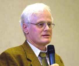 Der Historiker Ulrich Lins, Boulogne-sur-Mer 2005, Jubiläumsveranstaltung 100 Jahre Esperanto-Weltkongress.